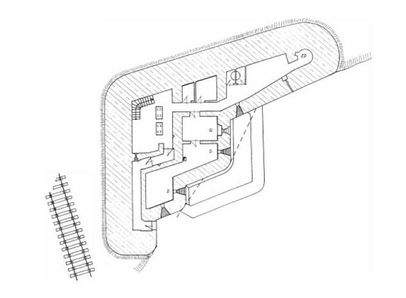 Schemat czechosłowackiego bunkra (wschodnia część) MO S-5 "Na Trati" w Boguminie.